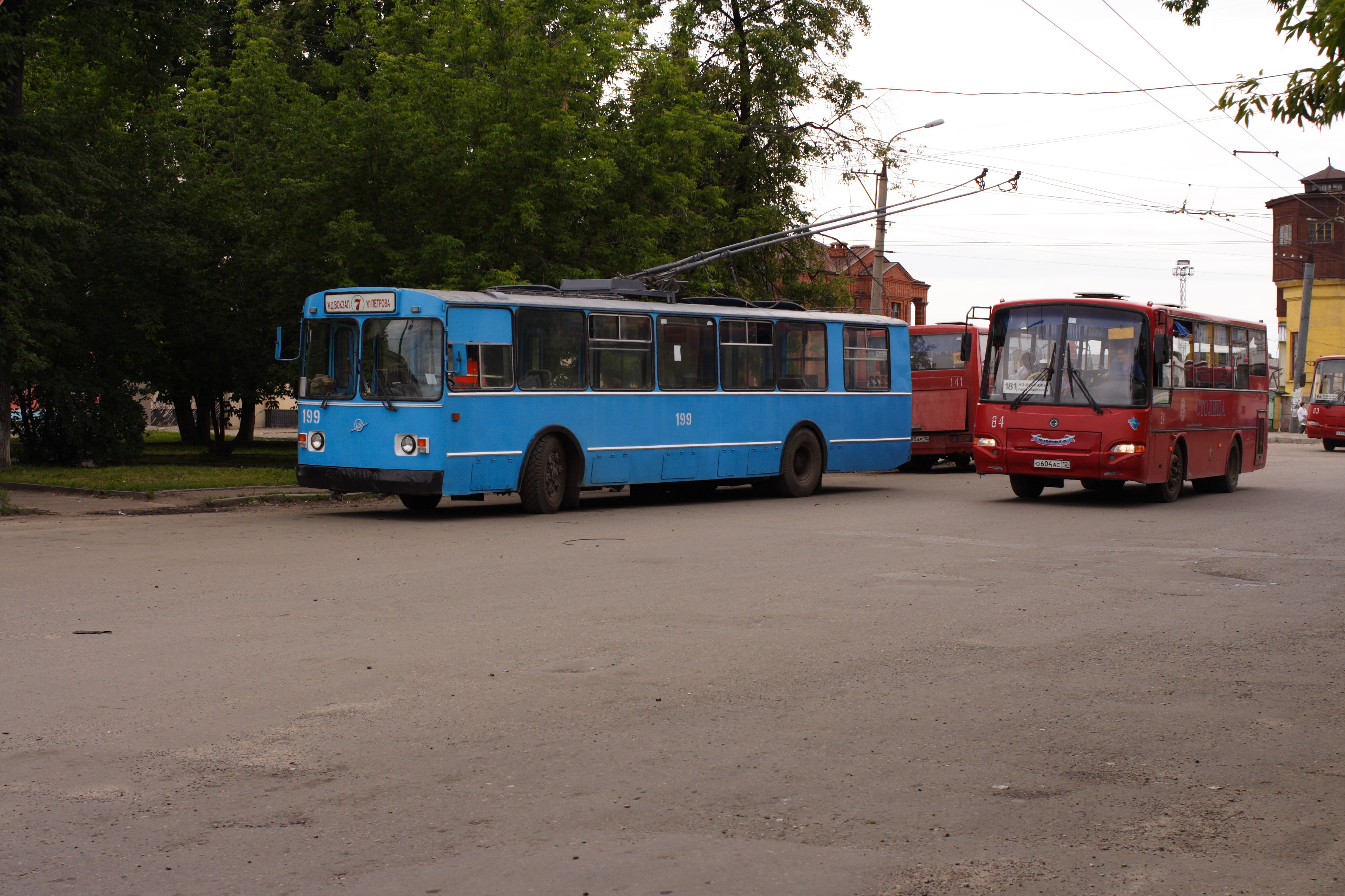 Троллейбус и автобус на привокзальной площади Йошкар-Олы